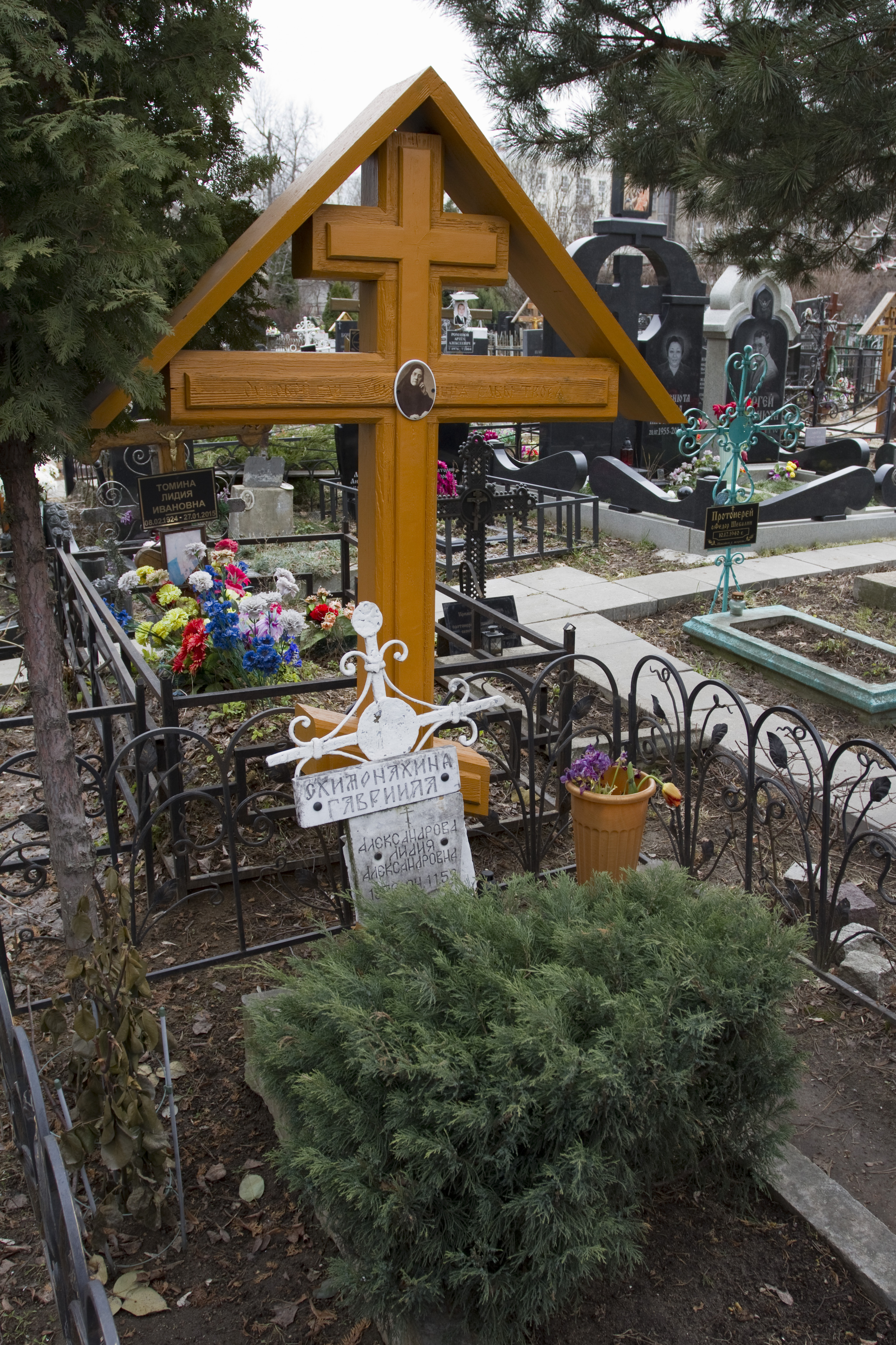 Могила схимонахини Гавриилы на Московском Алексеевском кладбище при храме Тихвинской иконы Божией Матери на ВДНХ